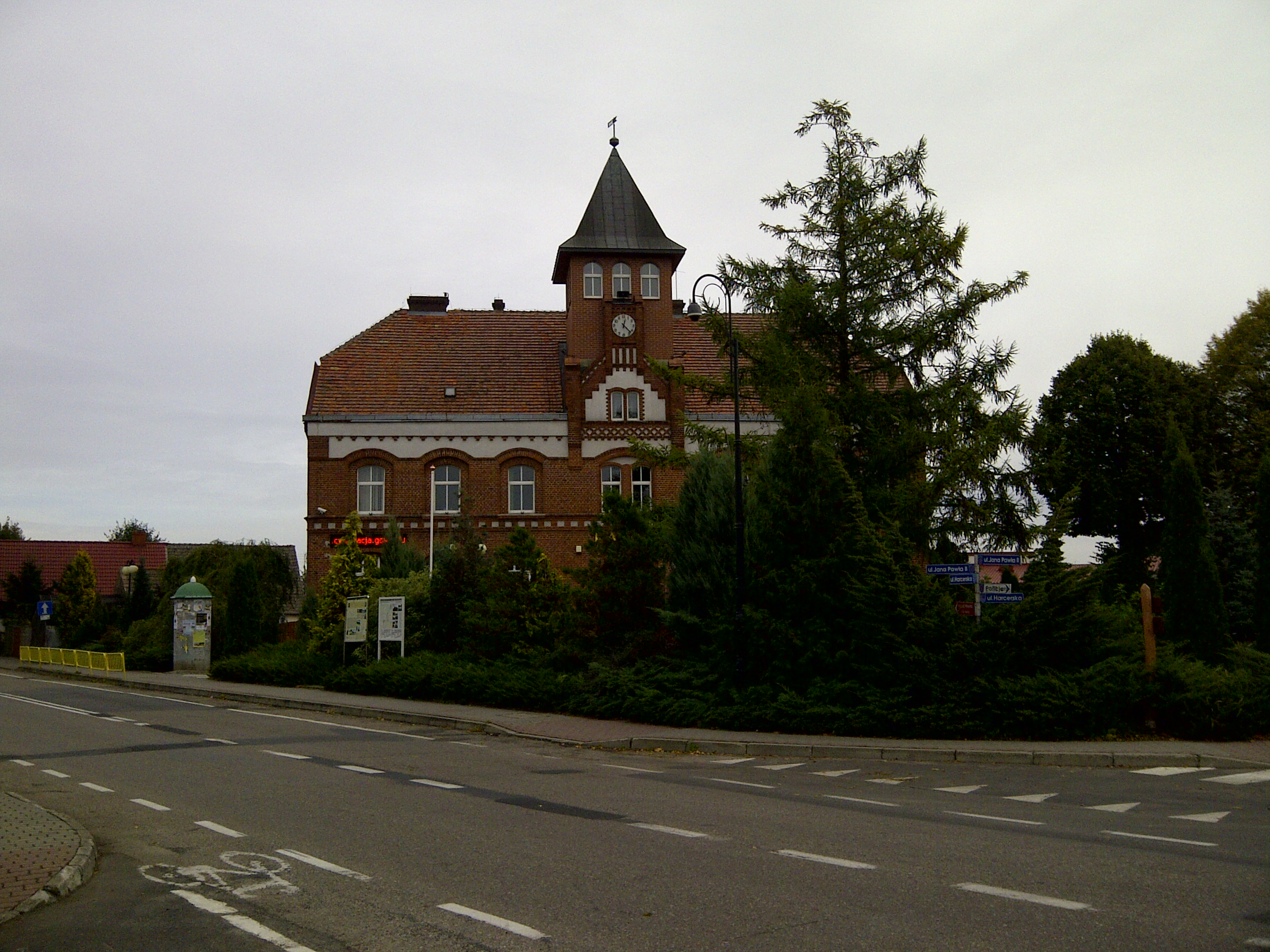 Raadhuis van Lubniewice